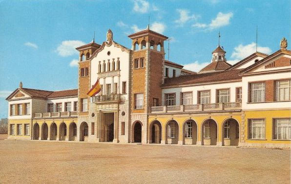 Col·legi Residència dels salesians construït a l'entorn de l'antiga ermita del Roser (Reus, Baix Camp).